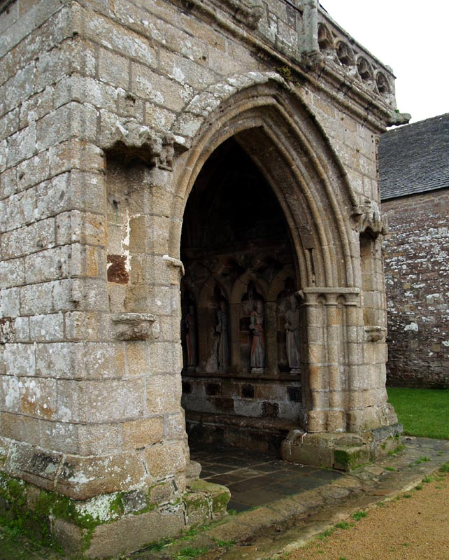 Chapelle Kermaria an Iskuit, commune de Plouha, Côtes-d'Armor (22), France. Le porche.